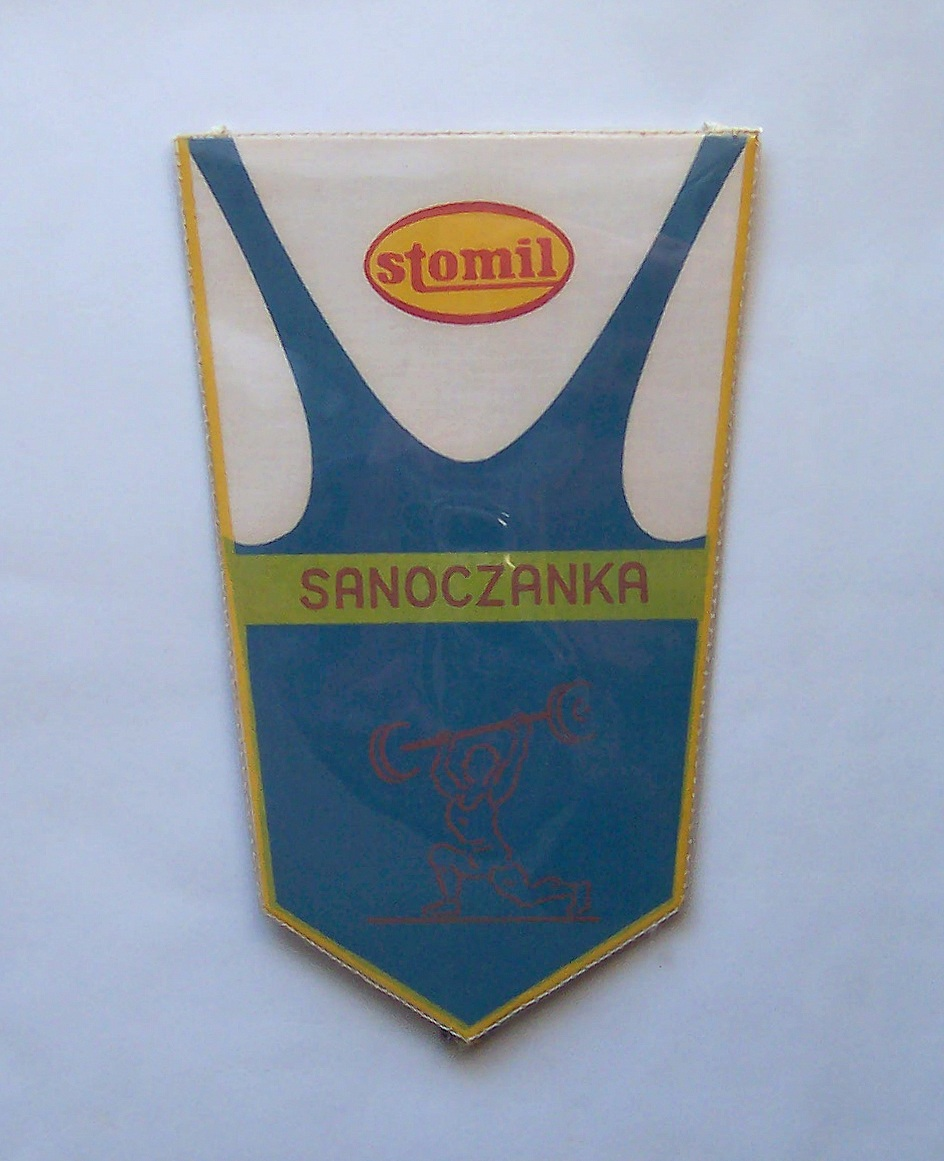 Proporczyk Sanoczanki Sanok w podnoszeniu ciężarów.